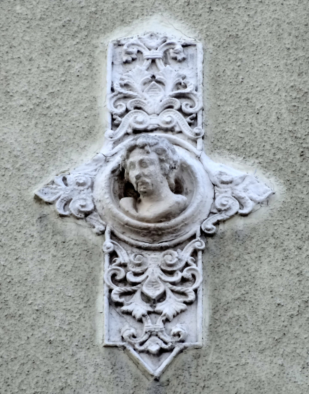 Kamienica przy ul. Długiej 58 w Bydgoszczy (2 poł. XIX w.)